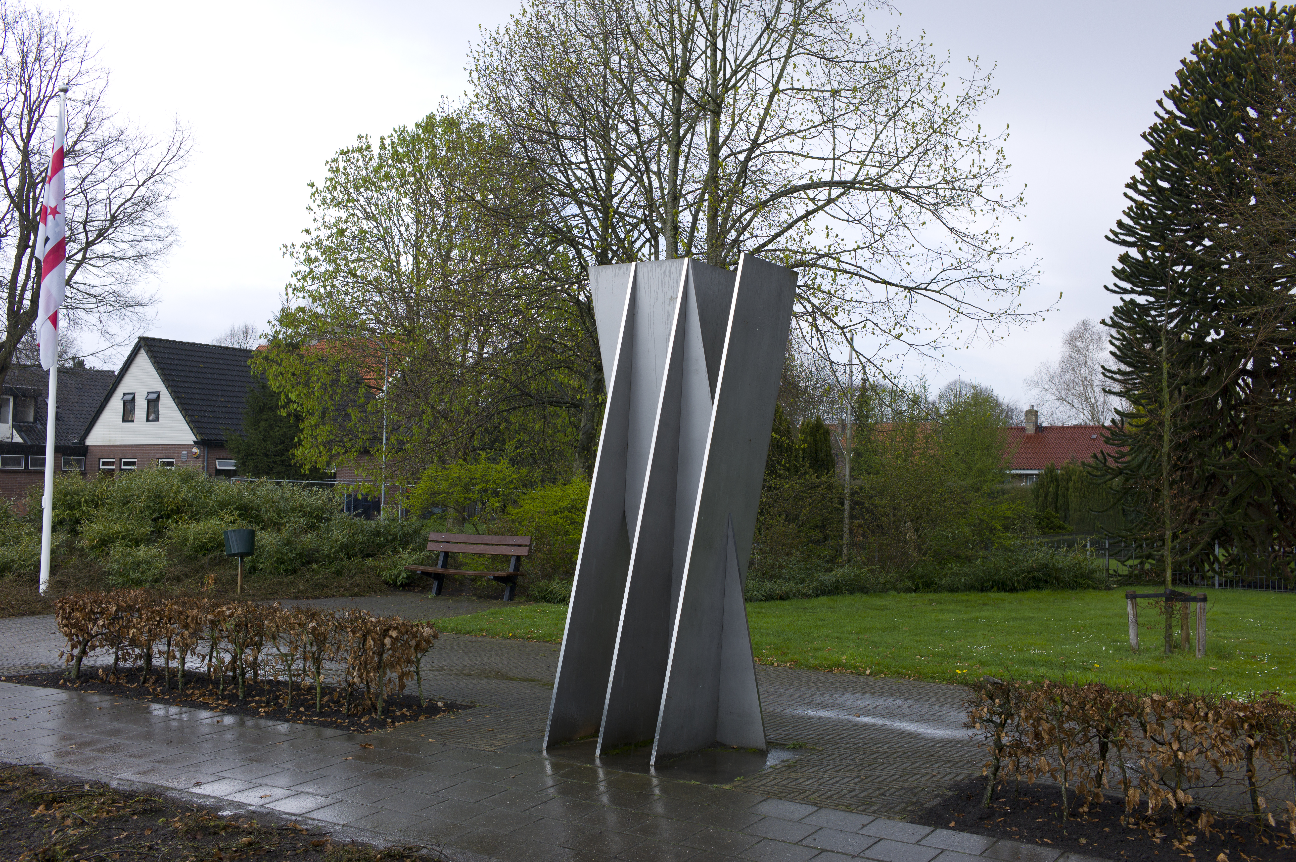 Groot metalen object, bestaande uit vier metalen platen. Het object heeft een duidelijke symboliek. De platen staan naar voren gericht, waarmee de kunstenaar de onverzettelijke houding van de bevolking wilde uitdrukken. Van de vier platen staan er drie 'in het gelid' en symboliseren de bevolking van Nieuwlande. De vierde plaat is verborgen achter de andere drie en symboliseert de onderduikers, die door bevolking van Nieuwlande werden geholpen. De vier platen houden elkaar in evenwicht.